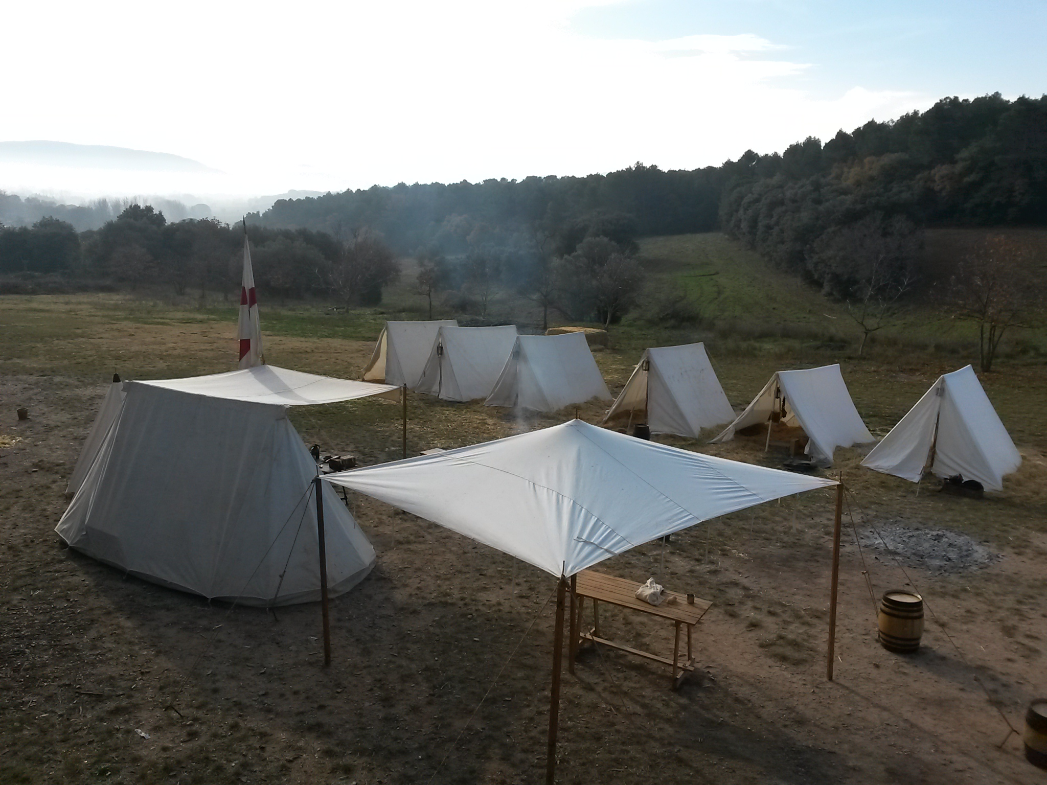 Campament militar de 1713, recreat per Miquelets de Catalunya